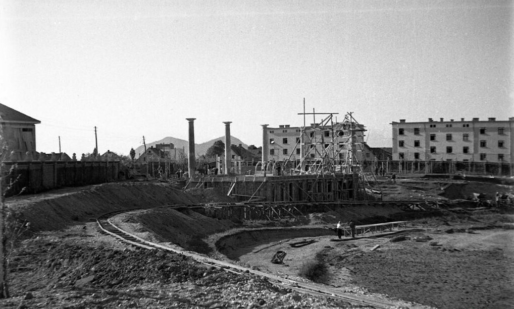 Gradnja Bežigrajskega stadiona.